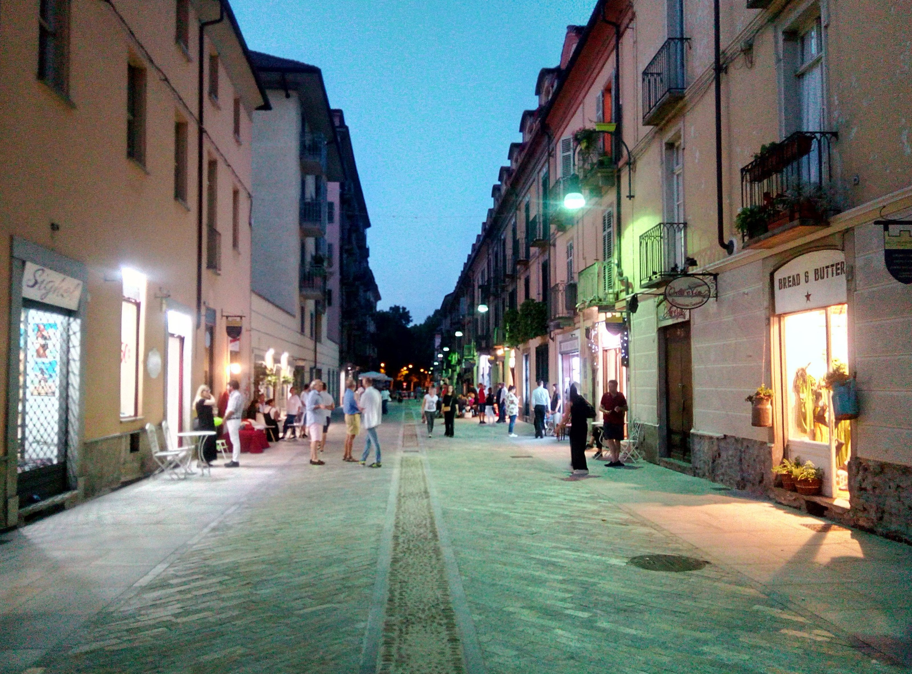 Via Monferrato di notte dopo la pedonalizzazione